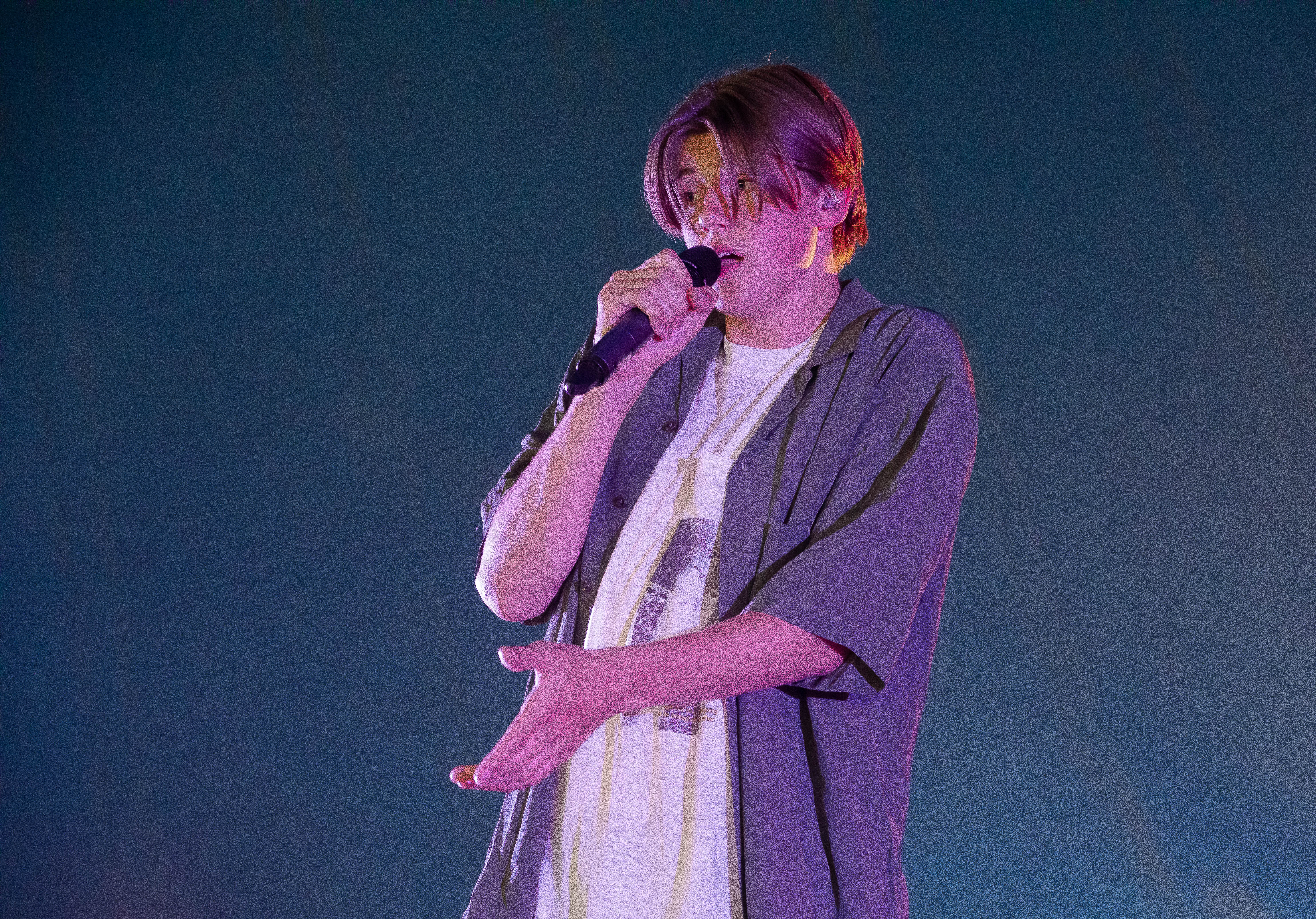 Ruel